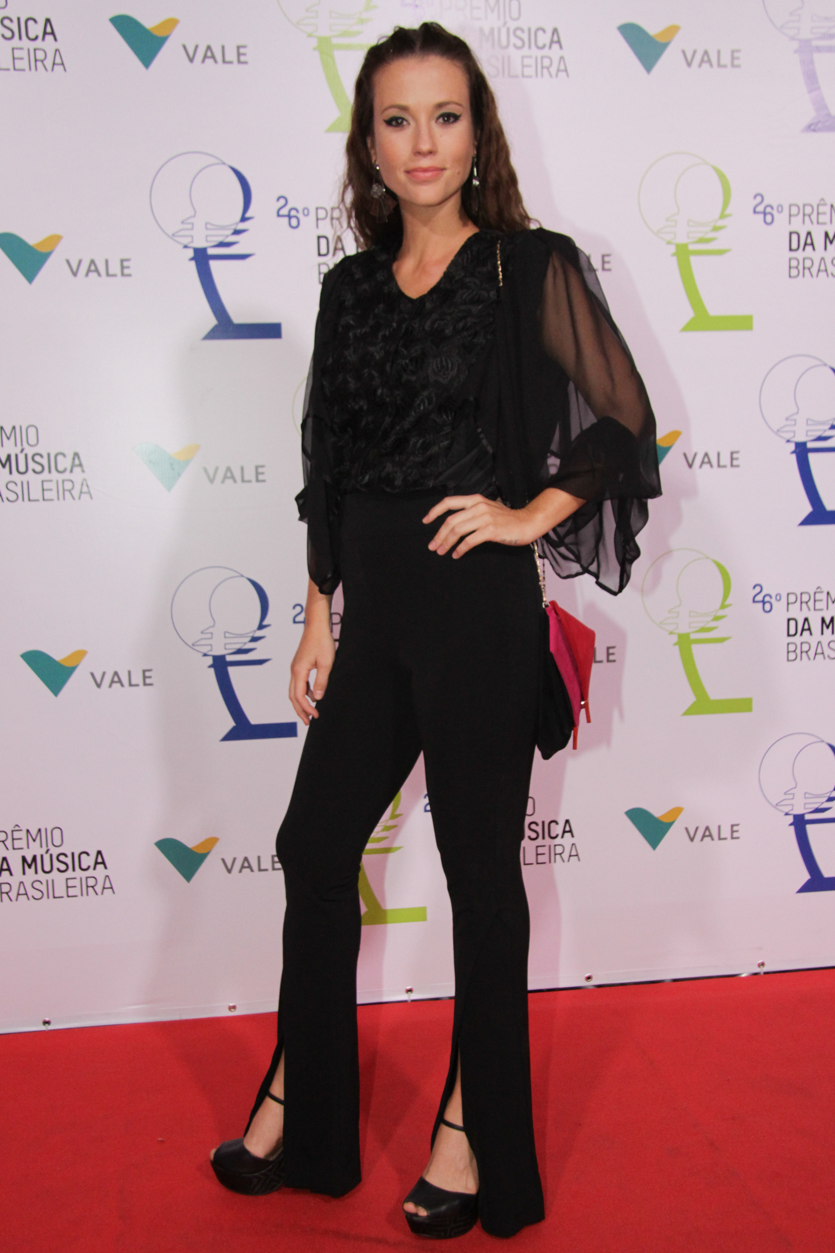 Juliana Didone - 26° Prêmio da Música Brasileira 2015, no Theatro Municipal, no Centro do Rio de Janeiro/RJ. (10/06/15) Foto: Roberto Valverde/Divulgacão